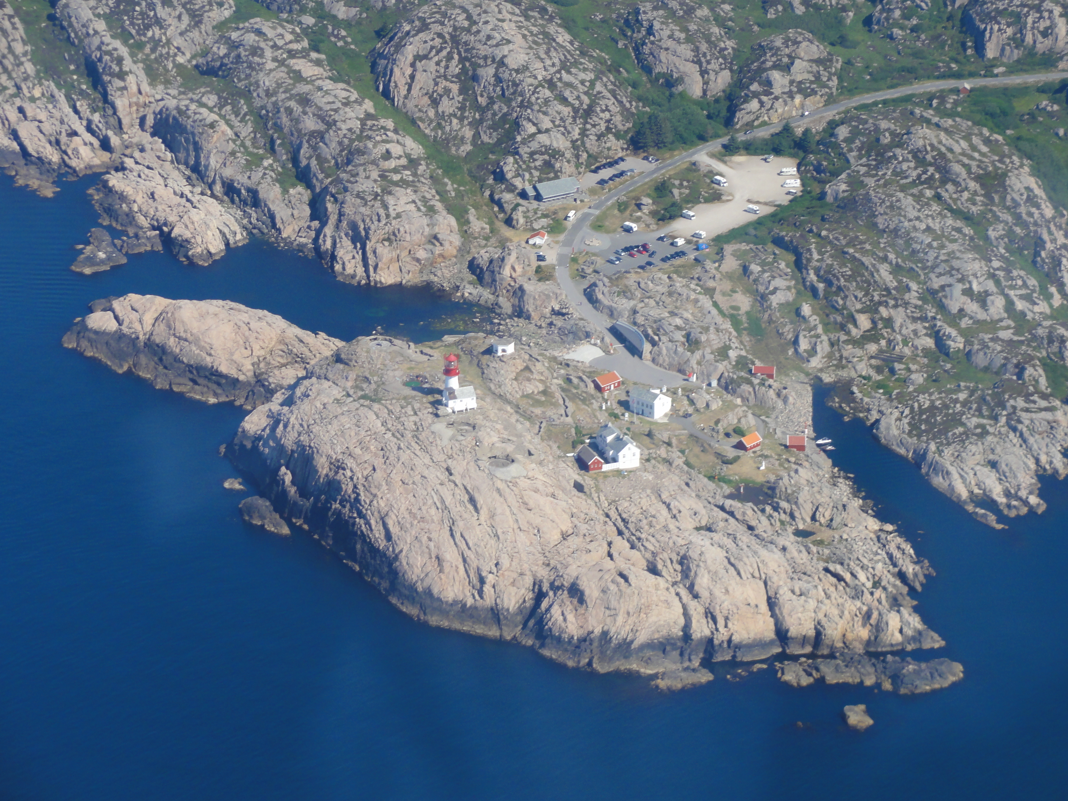 Lindesnes fyrstasjon sett fra fly.